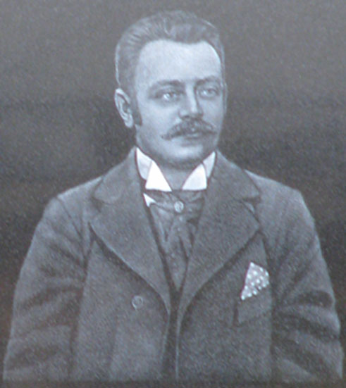 Eduard Slavoljub Penkala